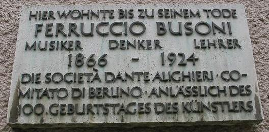 Gedenkschild für Ferruccio Busoni, Berlin - Berlin-Schöneberg, Victoria-Luise-Platz 11